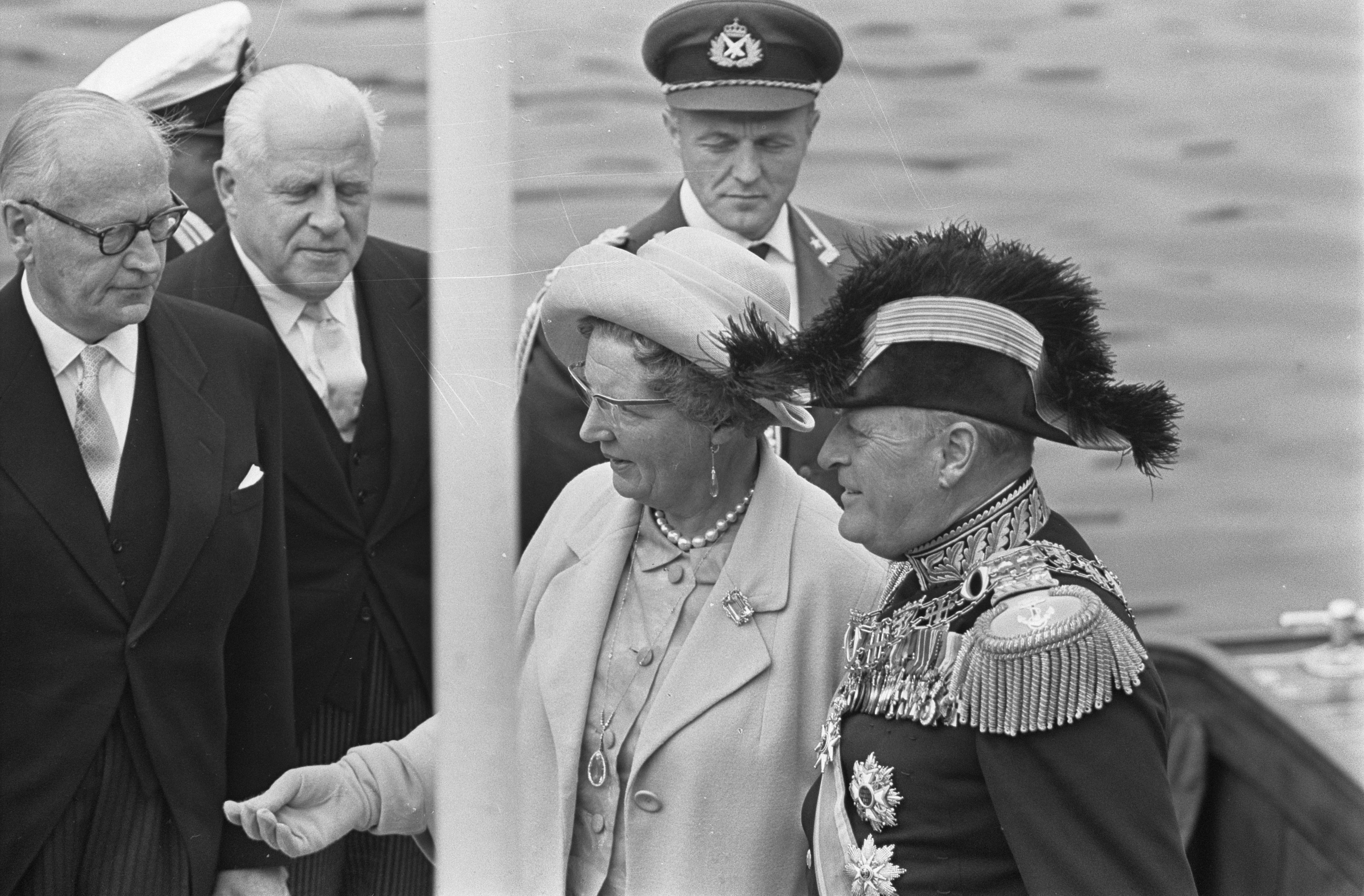 Collectie / Archief : Fotocollectie Anefo Reportage / Serie : Staatsbezoek van koning Olav van Noorwegen aan Nederland Beschrijving : Koningin Juliana en koning Olav (rechts) Datum : 9 september 1964 Locatie : Amsterdam, Noord-Holland Trefwoorden : staatsbezoeken Persoonsnaam : Juliana, koningin, Olav, koning van Noorwegen Fotograaf : Nijs, Jac. de / Anefo Auteursrechthebbende : Nationaal Archief Materiaalsoort : Negatief (zwart/wit) Nummer archiefinventaris : bekijk toegang 2.24.01.05 Bestanddeelnummer : 916-8563